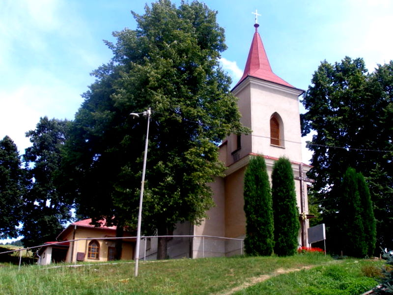 Obec Sedlice kostol Premenenia Pána. Okres Prešov.